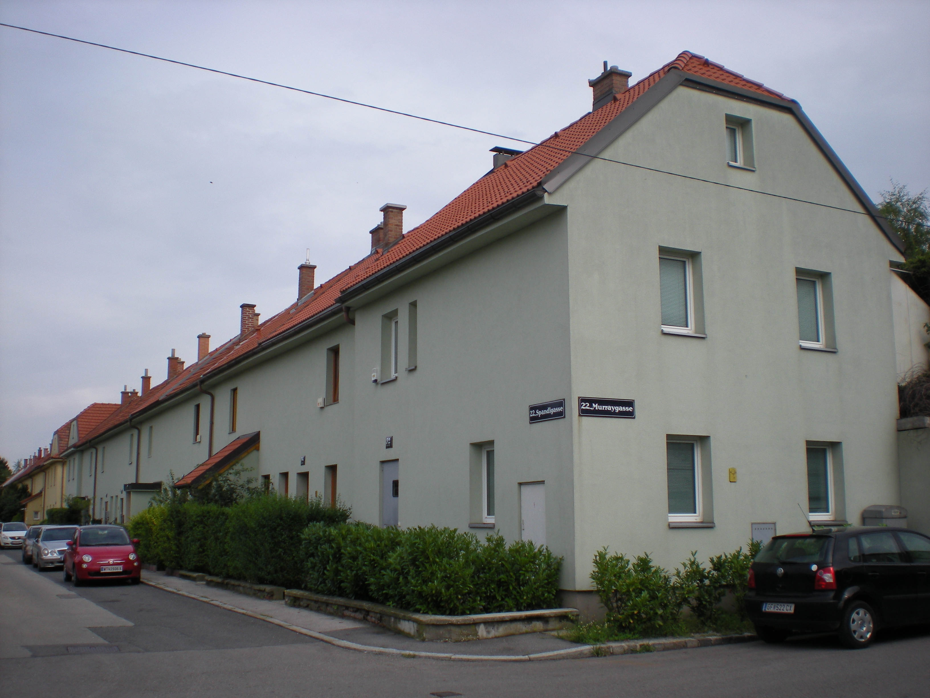 Kriegerheimstätte in Wien, Hirschstetten